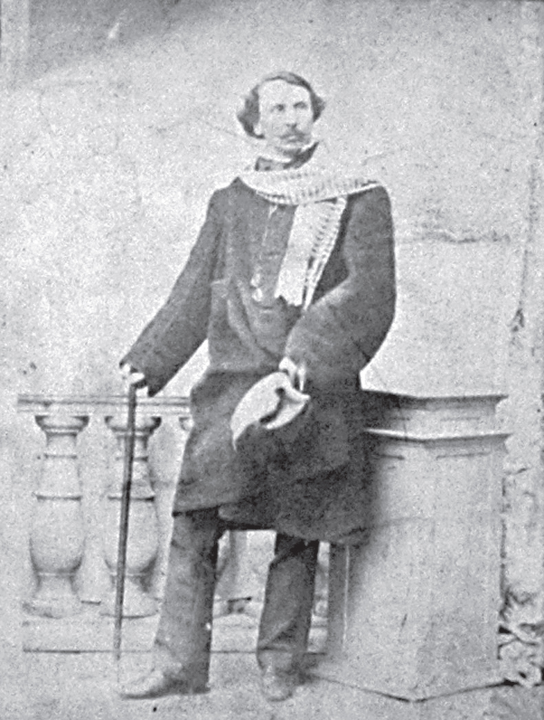 Беларуская (тарашкевіца): Партрэт Эдварда Паўловіча (Edvard Paŭłovič)